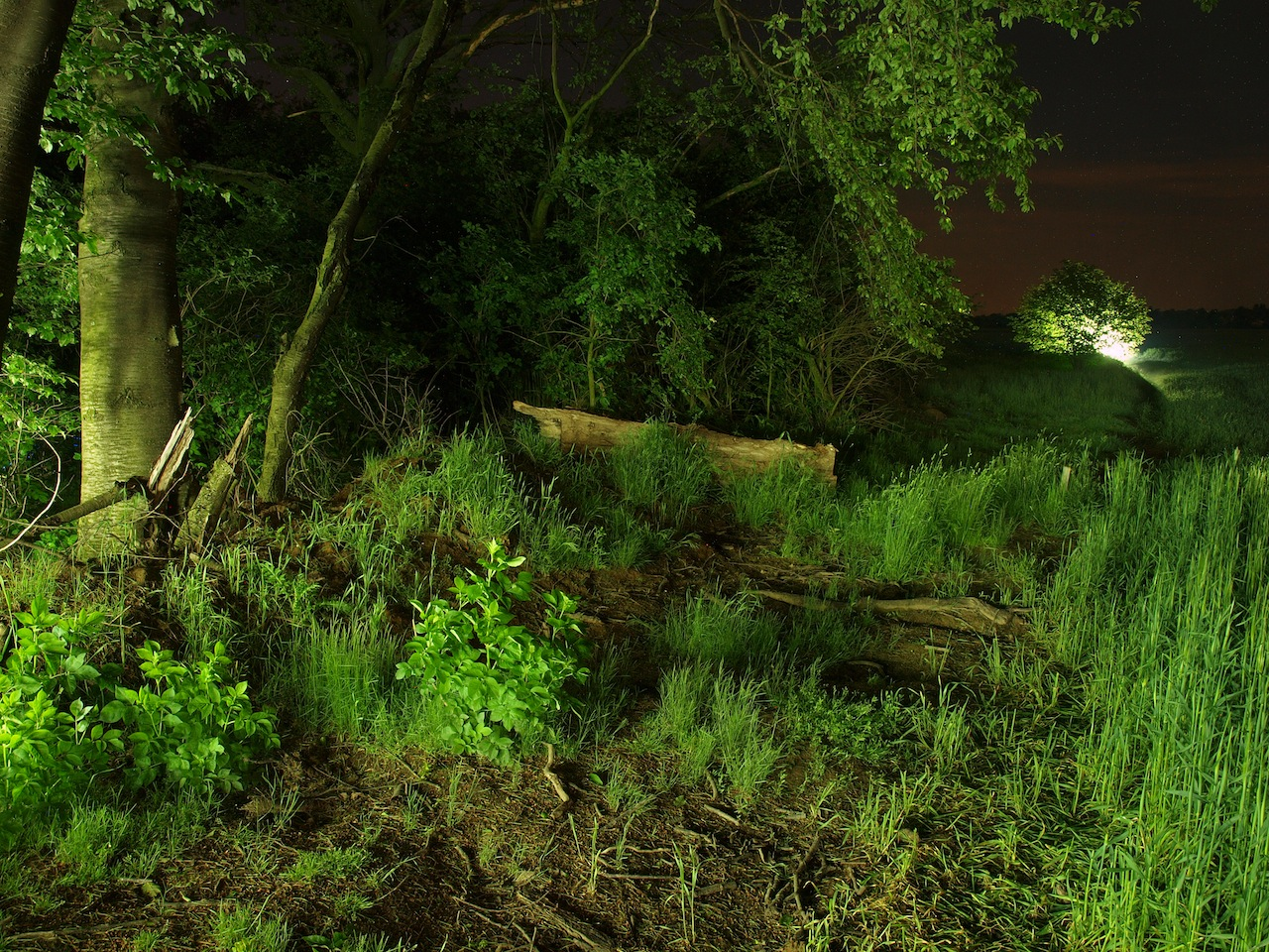 LED-Leuchten im Wald